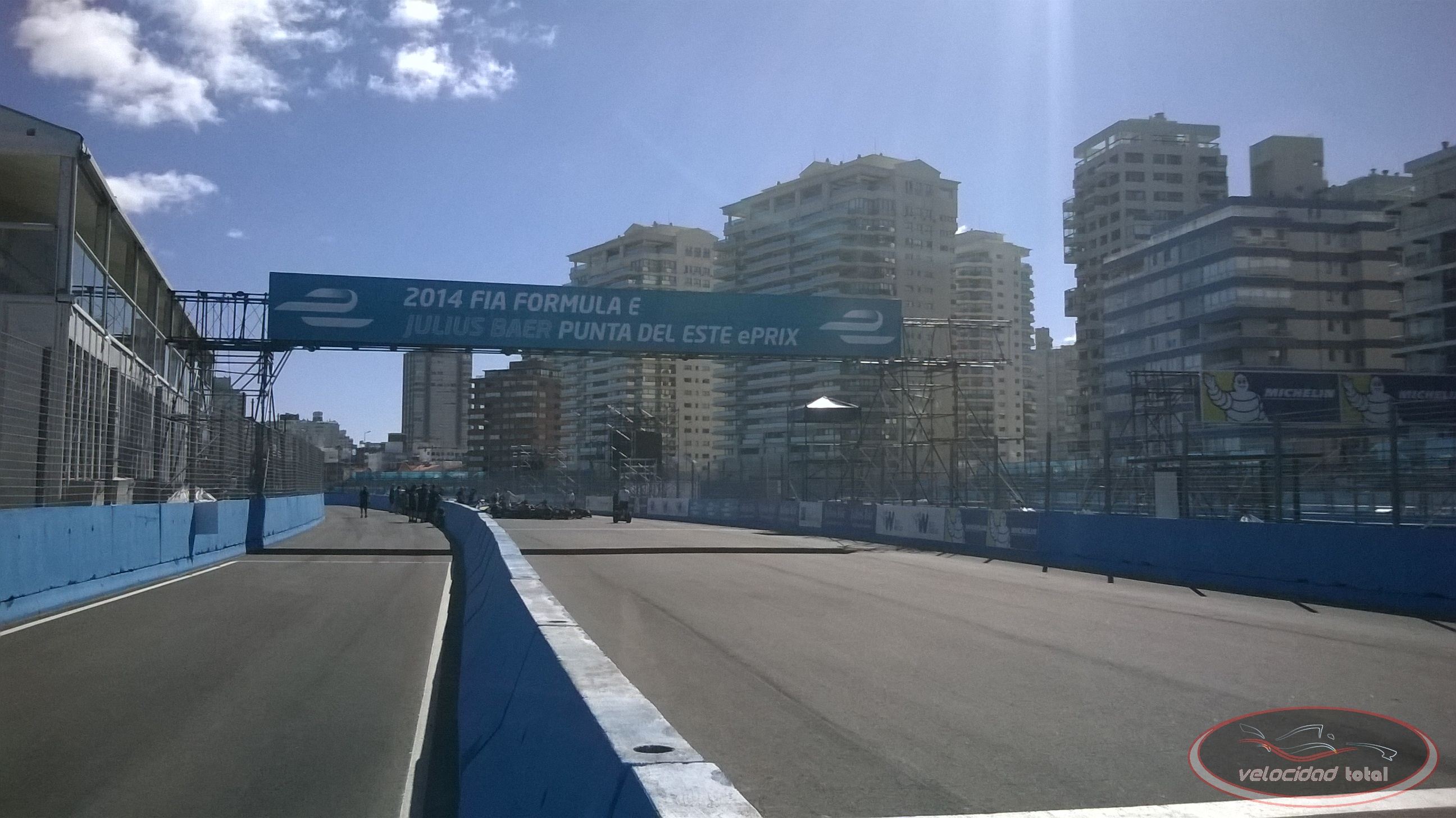 Solo se permite el uso de esta imagen mencionando a Velocidad Total como su autor. Imagen del Punta del Este ePrix de 2014.